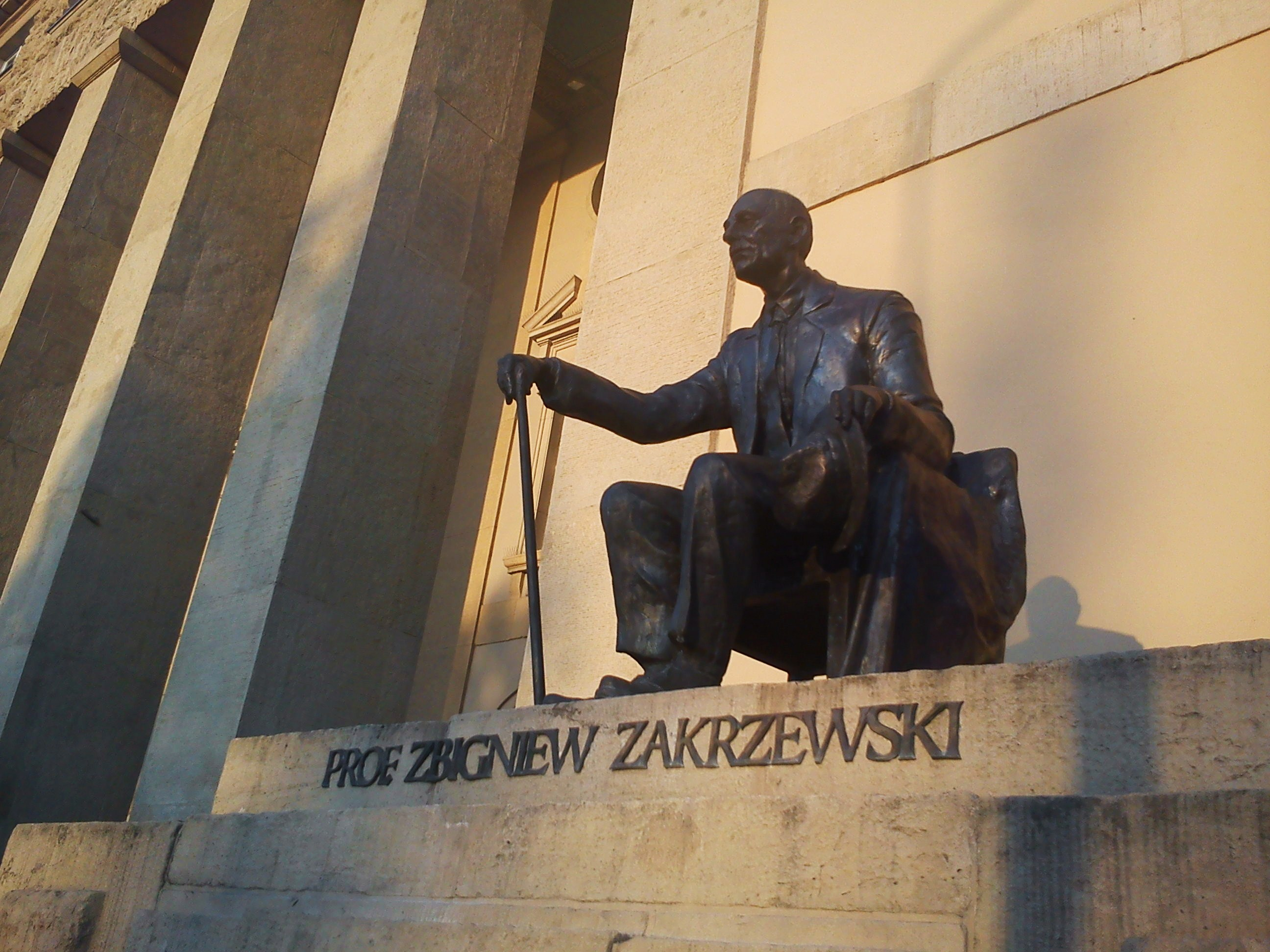 Monument of Zbigniew Zakrzewski, Poznań. University of Economics, Niepodległości Av.